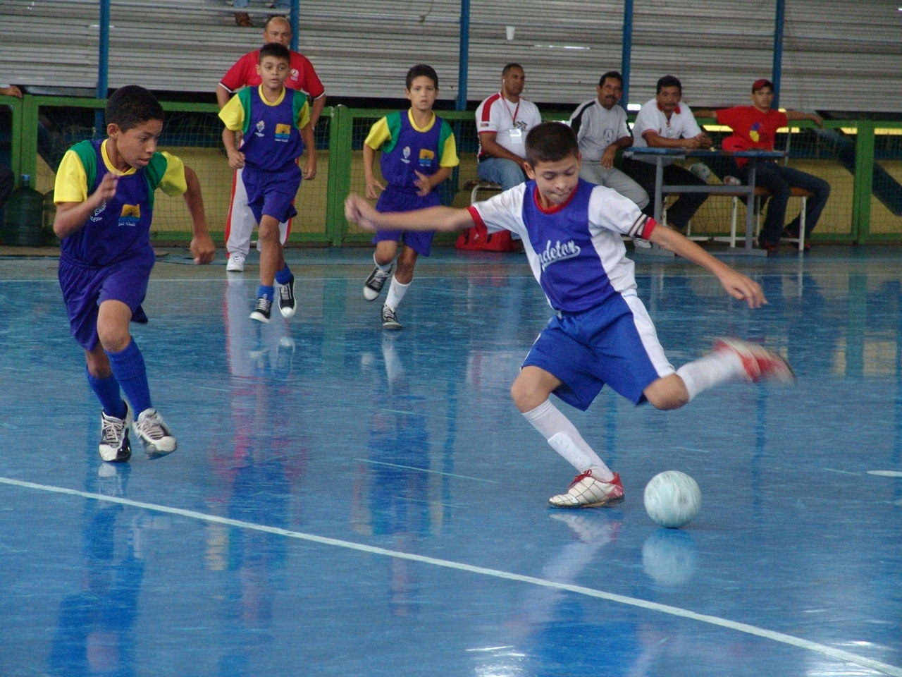 juego de futbol de salon infantil